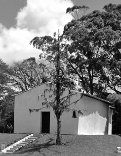 capela santa barbara do pitangui